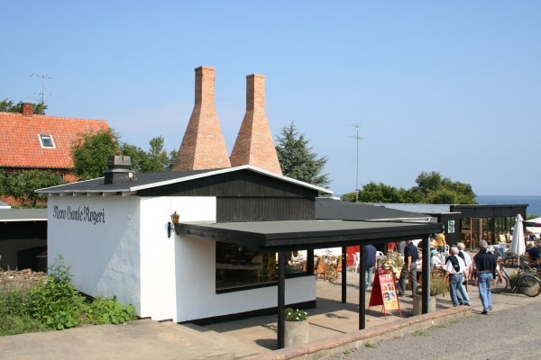 Nexø, gamle røgeri / alte Fischräucherei